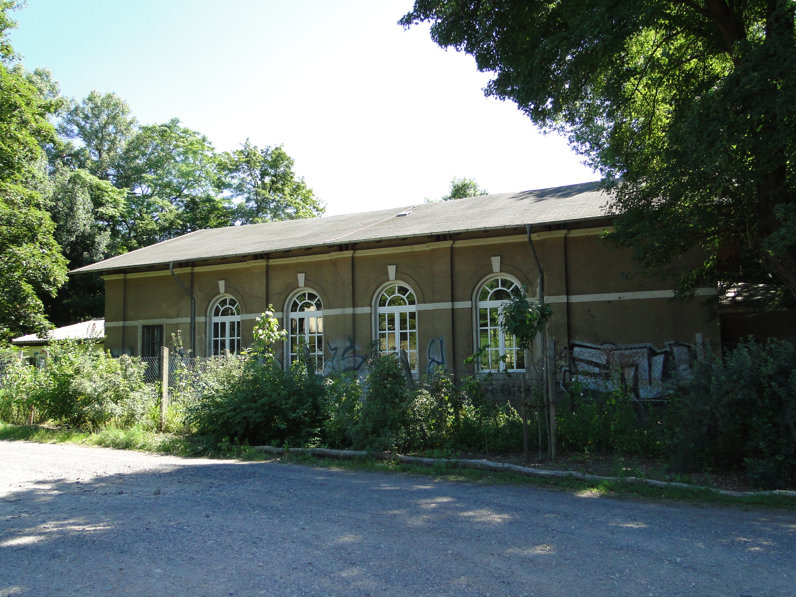 Turnhalle des Fletcherschen Lehrerseminars in Dresden, heute zur Waldorfschule Dresden gehörend